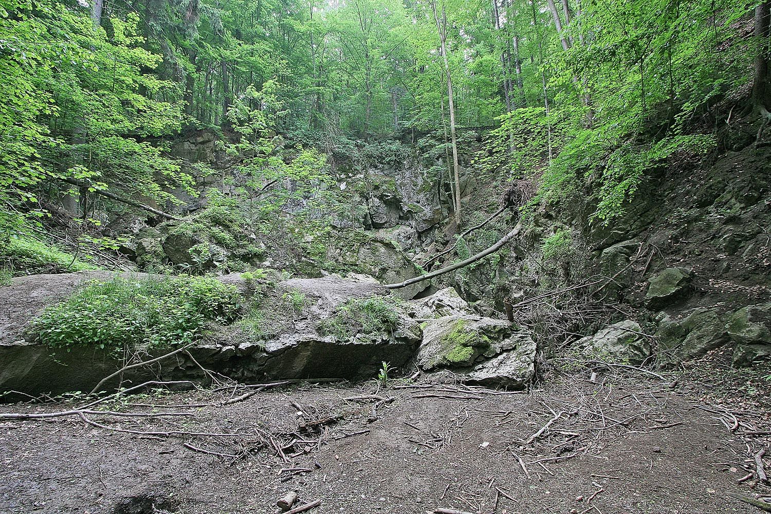 Propadání u Nové Rasovny u Holštejna